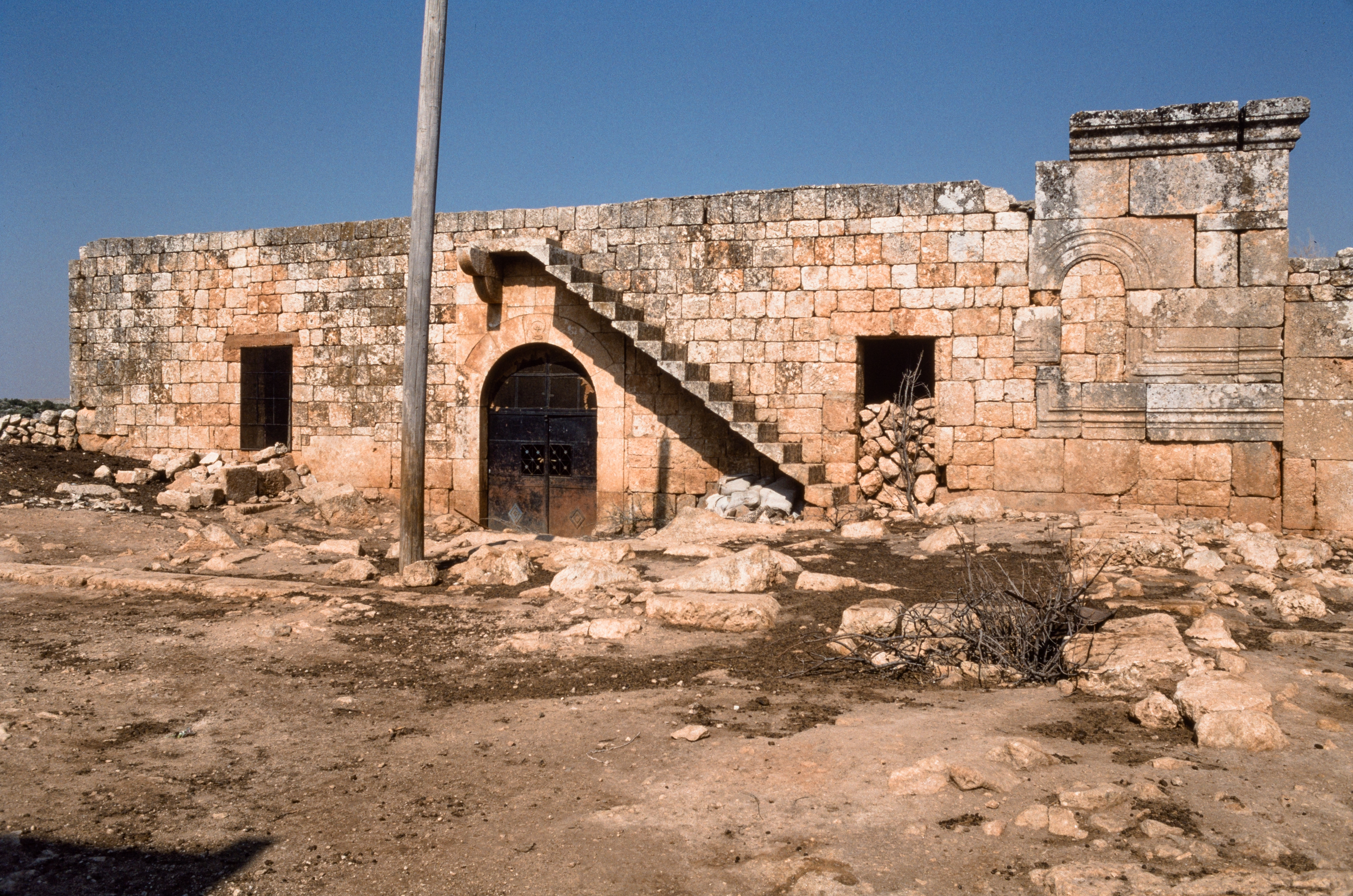 تبين الصورة الواجهة الغربية للكنيسة الشمالية في دير سيتا-سوريا